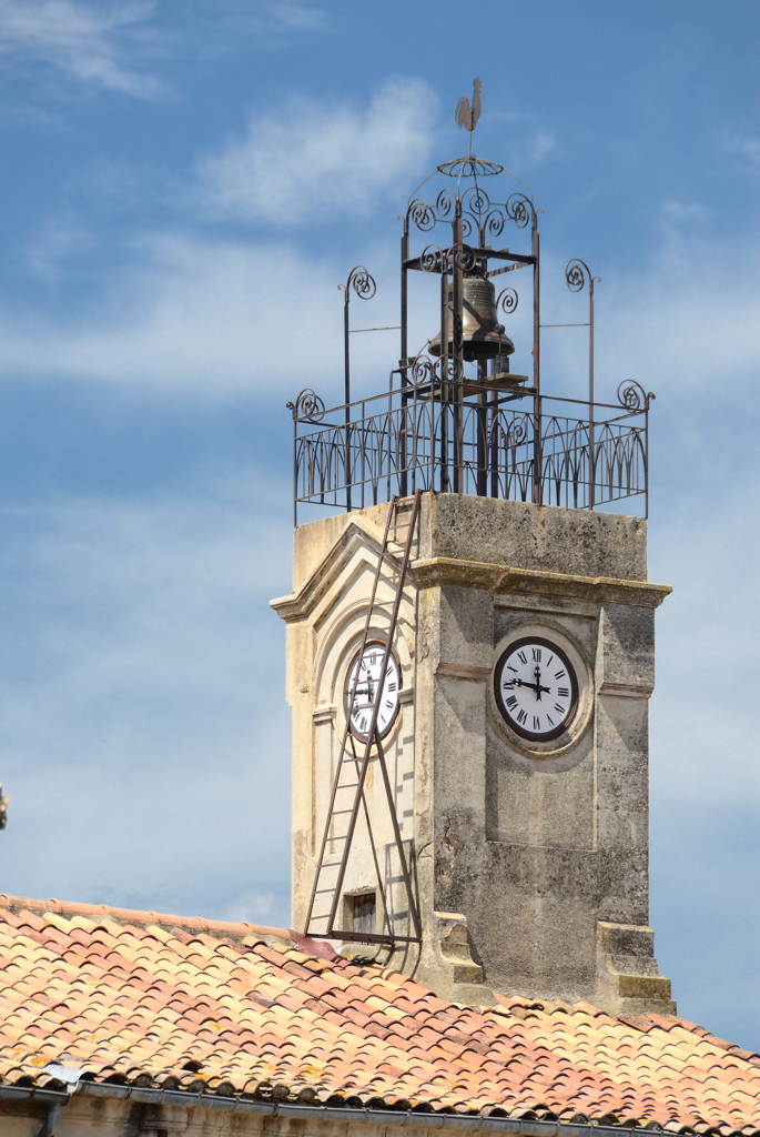 Vue du clocher du temple de Caveirac depuis la rue du temple.